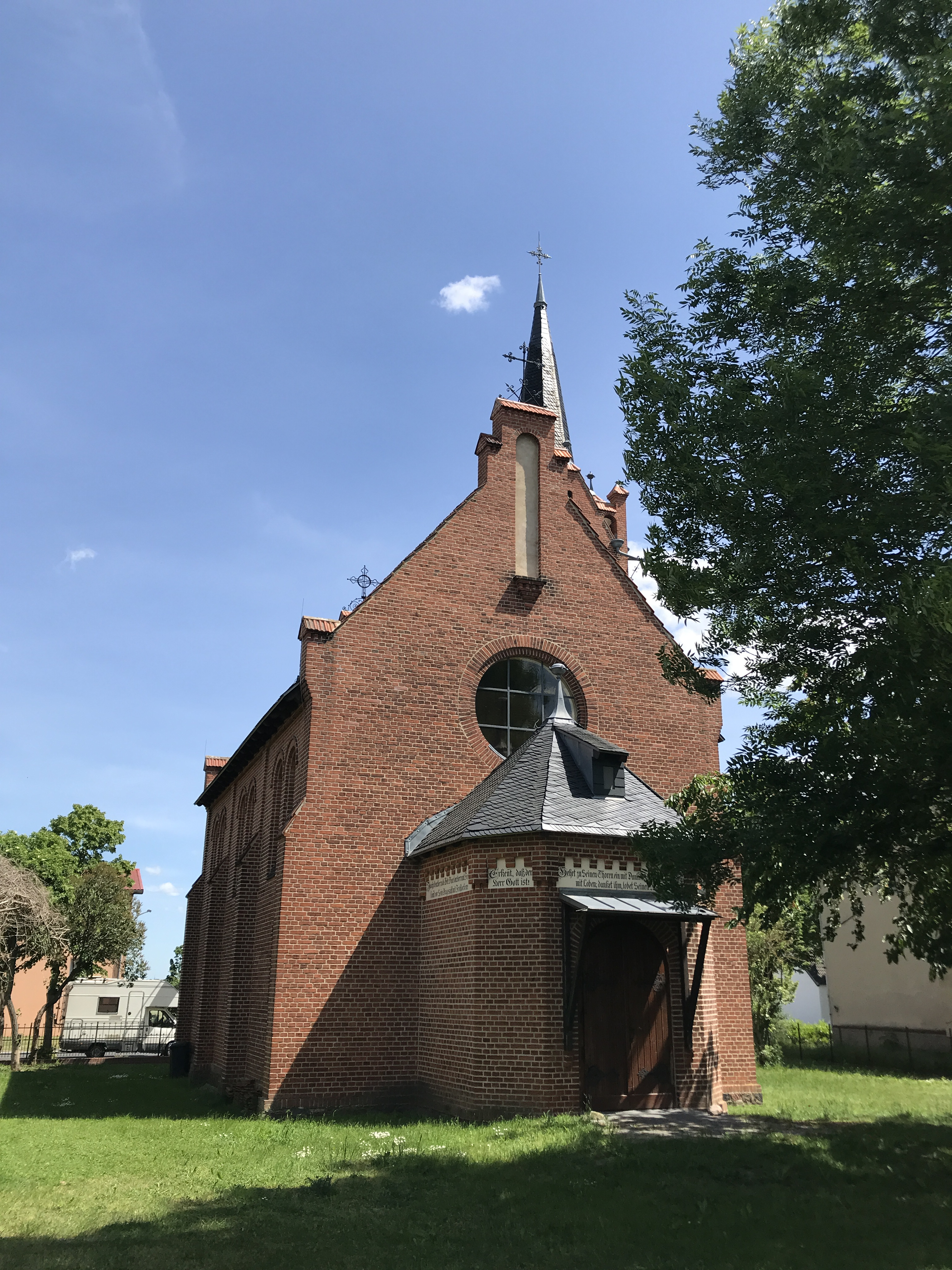 Die Dorfkirche Hoppenrade ist eine Backsteinkirche in der Hoppenrade, einem Ortsteil der Gemeinde Wustermark im Landkreis Havelland in Brandenburg. Im Innern steht unter anderem eine Lütkemüller-Orgel von 1895.